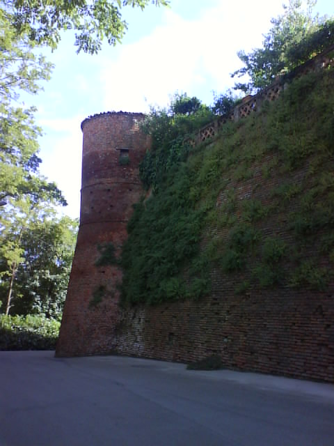 Monumento di Incisa Scapaccino